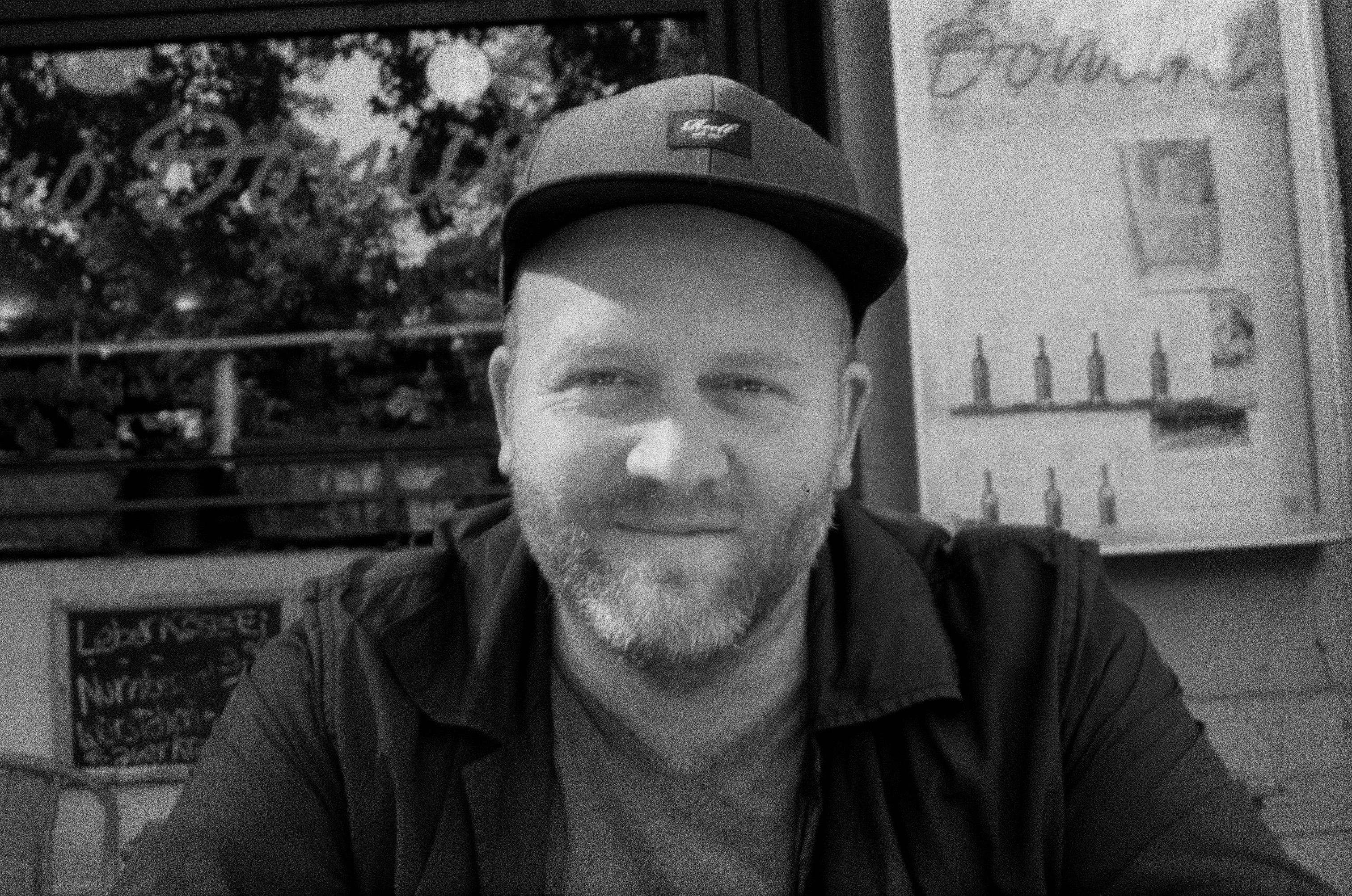 Portrait Sebastian Fritzsch